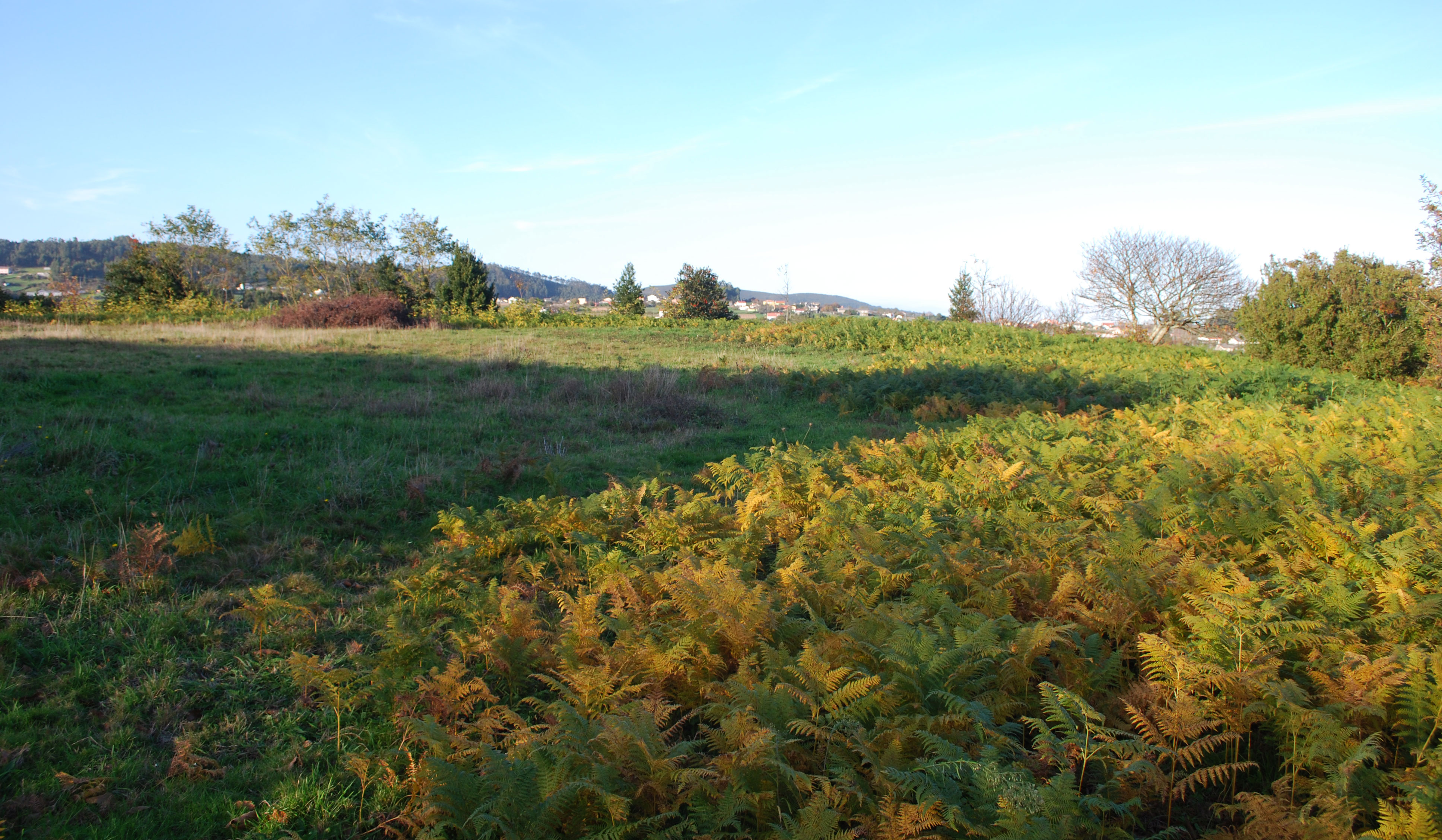 Vista interior da croa do castro da quintá en narón a coruña galiza spain